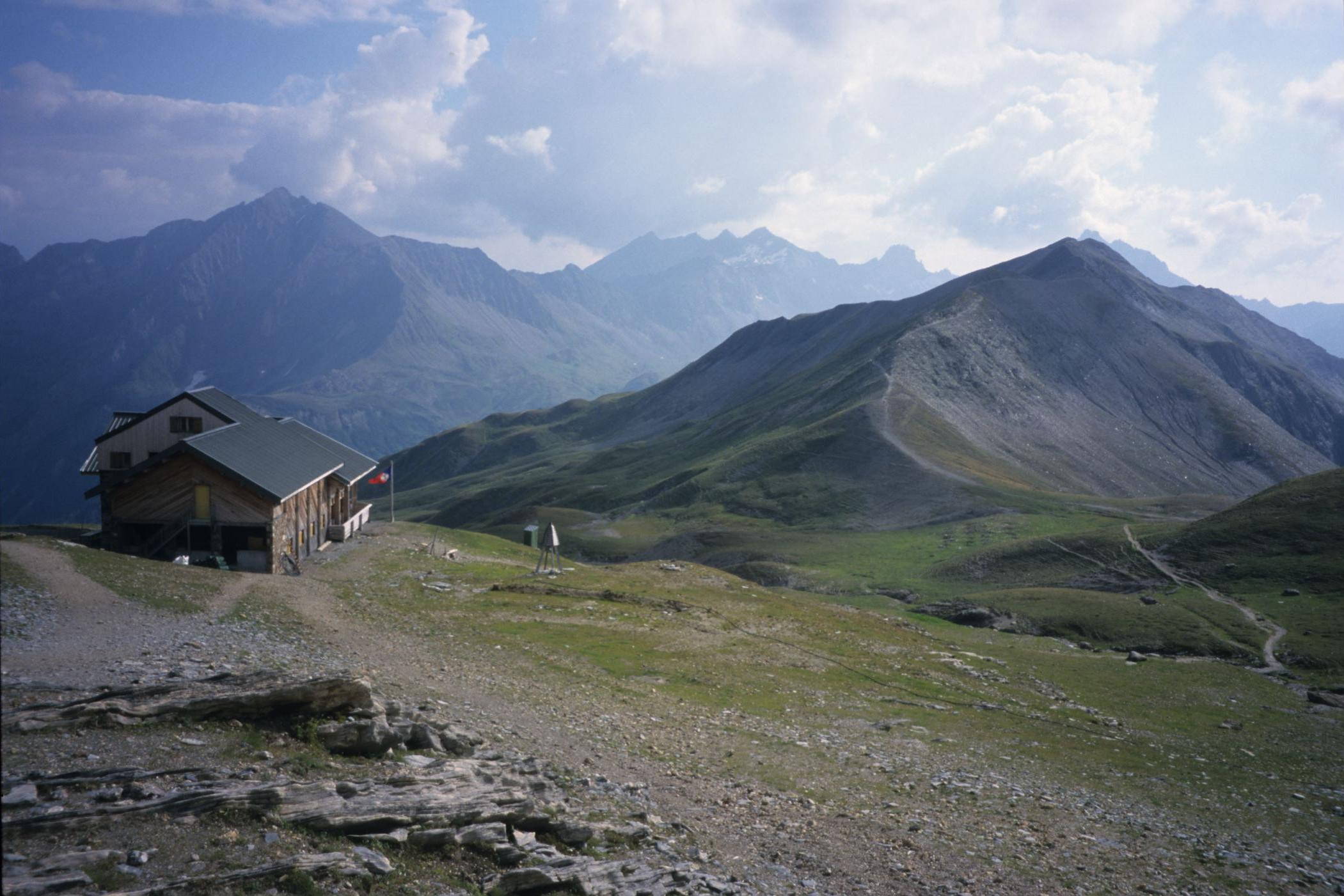 Le refuge de la Croix du Bonhomme